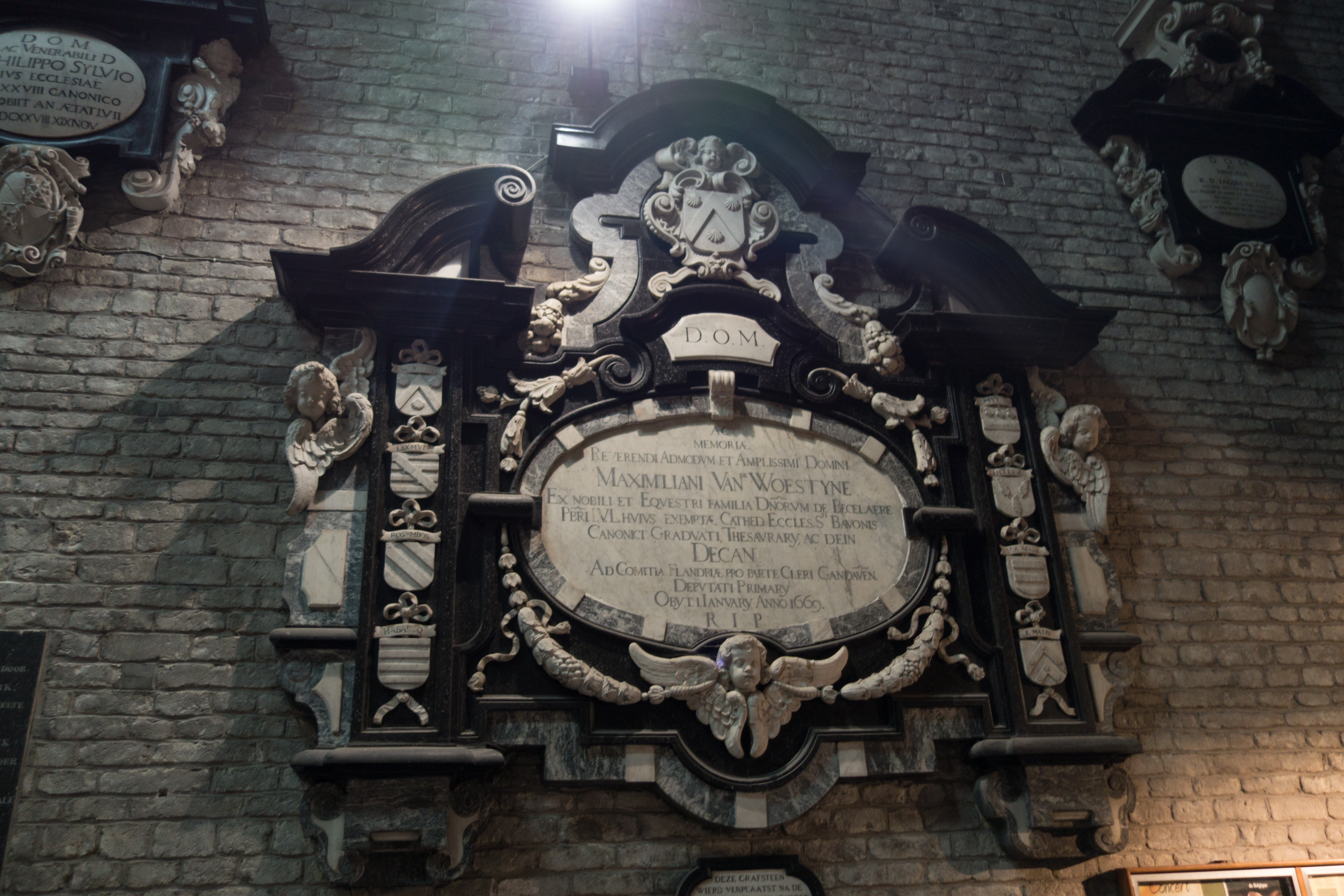 Belgium